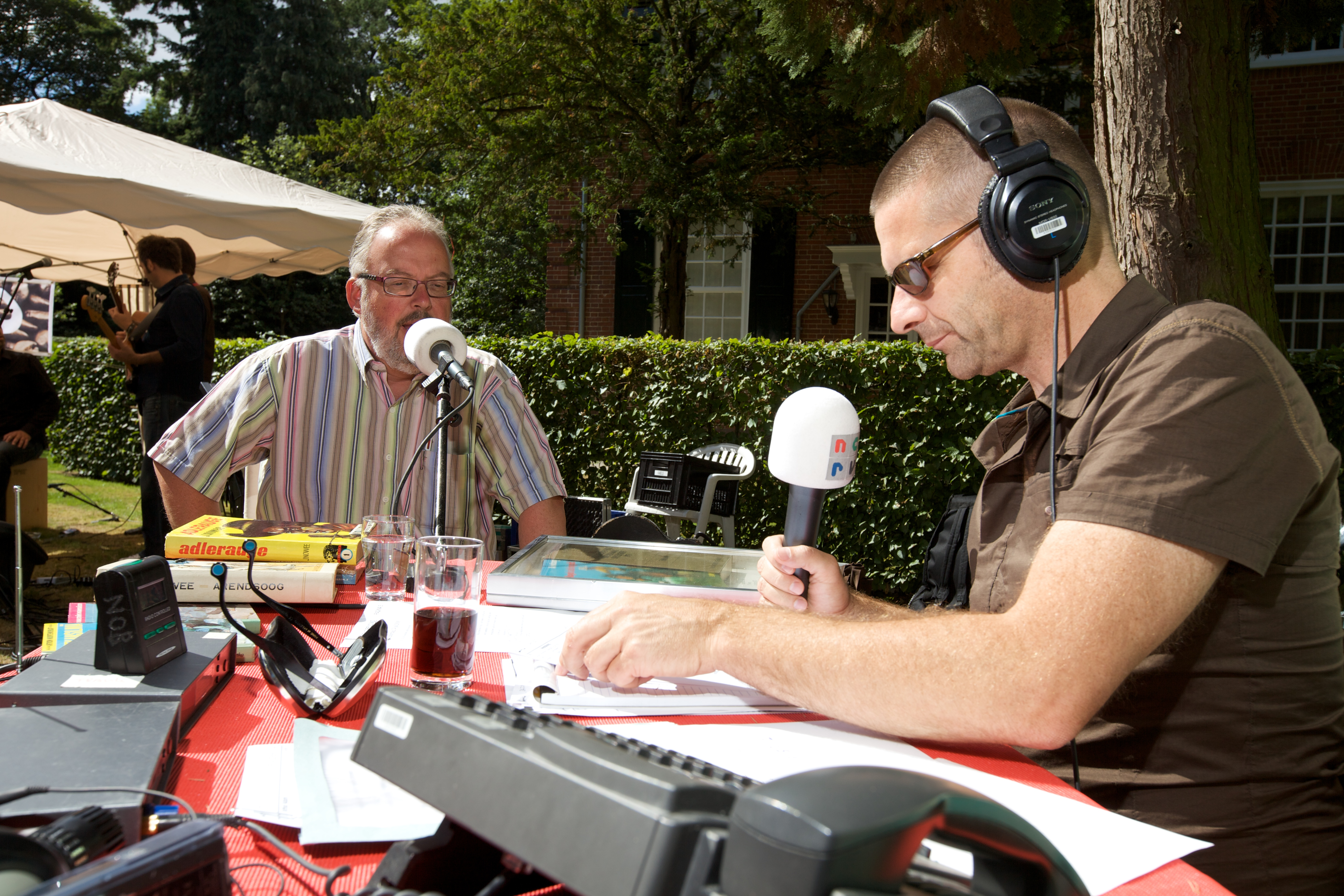 Jurgen van den Berg presentator van Radio Cappuccino volgt op 24 juli 2010 De VIPbus, foto's op locatie